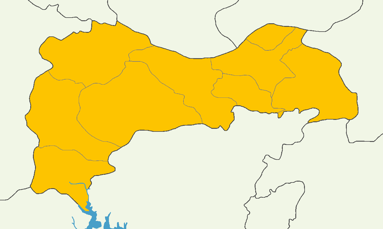 Erzincan'da 2014 Türkiye cumhurbaşkanlığı seçimi sonuçları